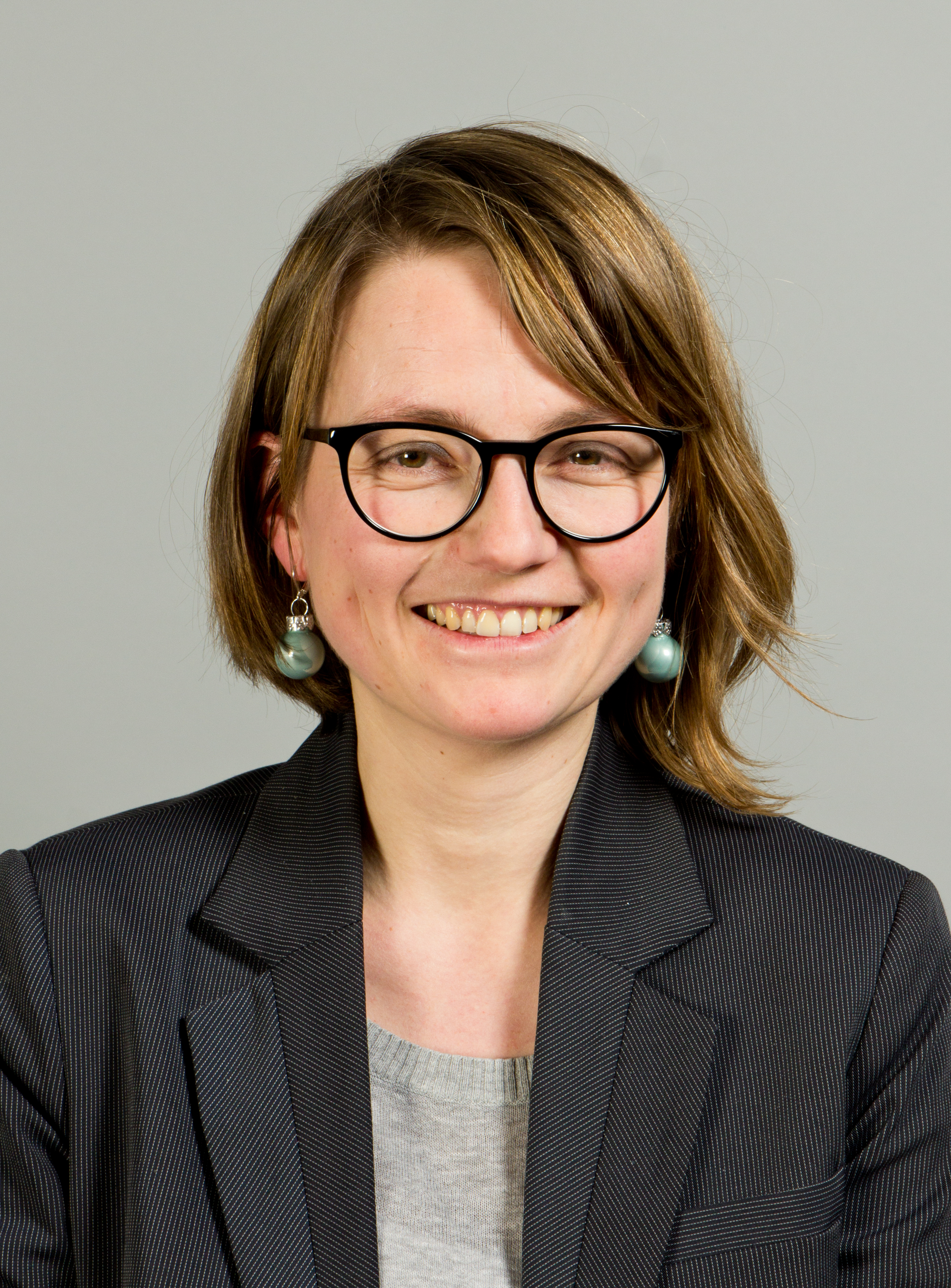 Annekatrin Klepsch (* 30. Juli 1977 in Dresden) ist eine deutsche Politikerin (Die Linke). Sie ist Abgeordnete des Sächsischen Landtags und Stadträtin der Stadt Dresden. Wikipedia im Landtag – Sachsen 17. bis 18. Dezember 2013 in DresdenDieses Foto wurde im Rahmen des Projektes „Wikipedia im Landtag“ erstellt. Fragen zur Nachnutzung Wenn Sie Fragen zur Nachnutzung dieses Bildes haben, können Sie sich jederzeit gern an wenden